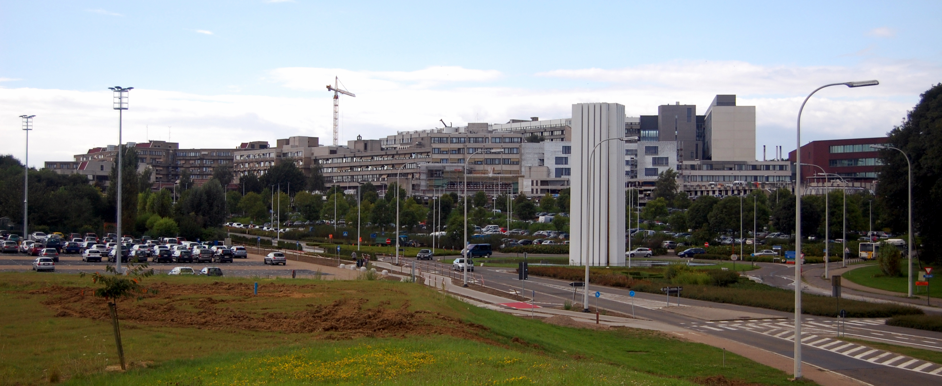 University Hospital Leuven, Gasthuisberg in Leuven, Belgium.